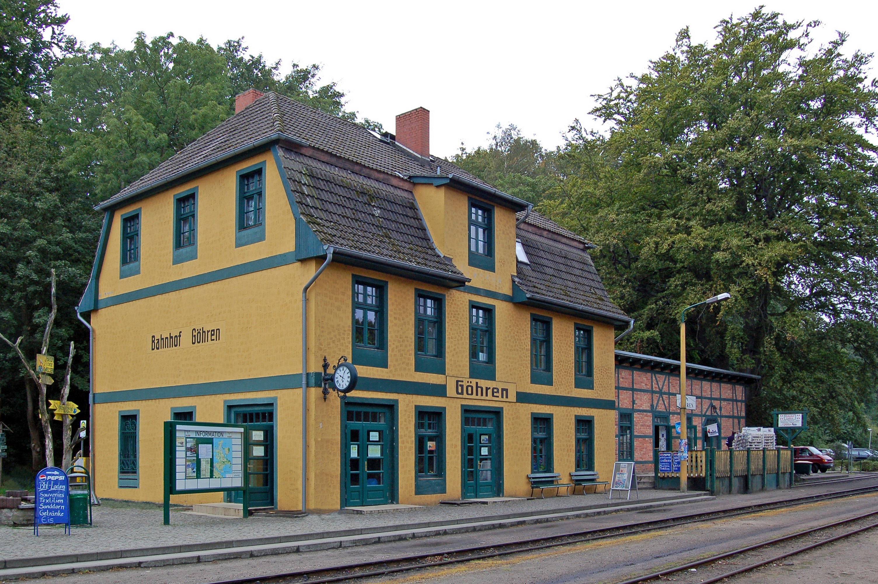 Das Dach müsste noch erneuert werden. Da müssen wohl noch einige Touristen ihre Fahrkarte lösen. Die Schmalspurbahn auf der Insel Rügen, gemein auch als »Rasender Roland« bekannt, verbindet von Göhren aus die Orte Baabe, Sellin, Jagdschloss Granitz, Binz, Putbus mit dem zweiten Endbahnhof Lauterbach.